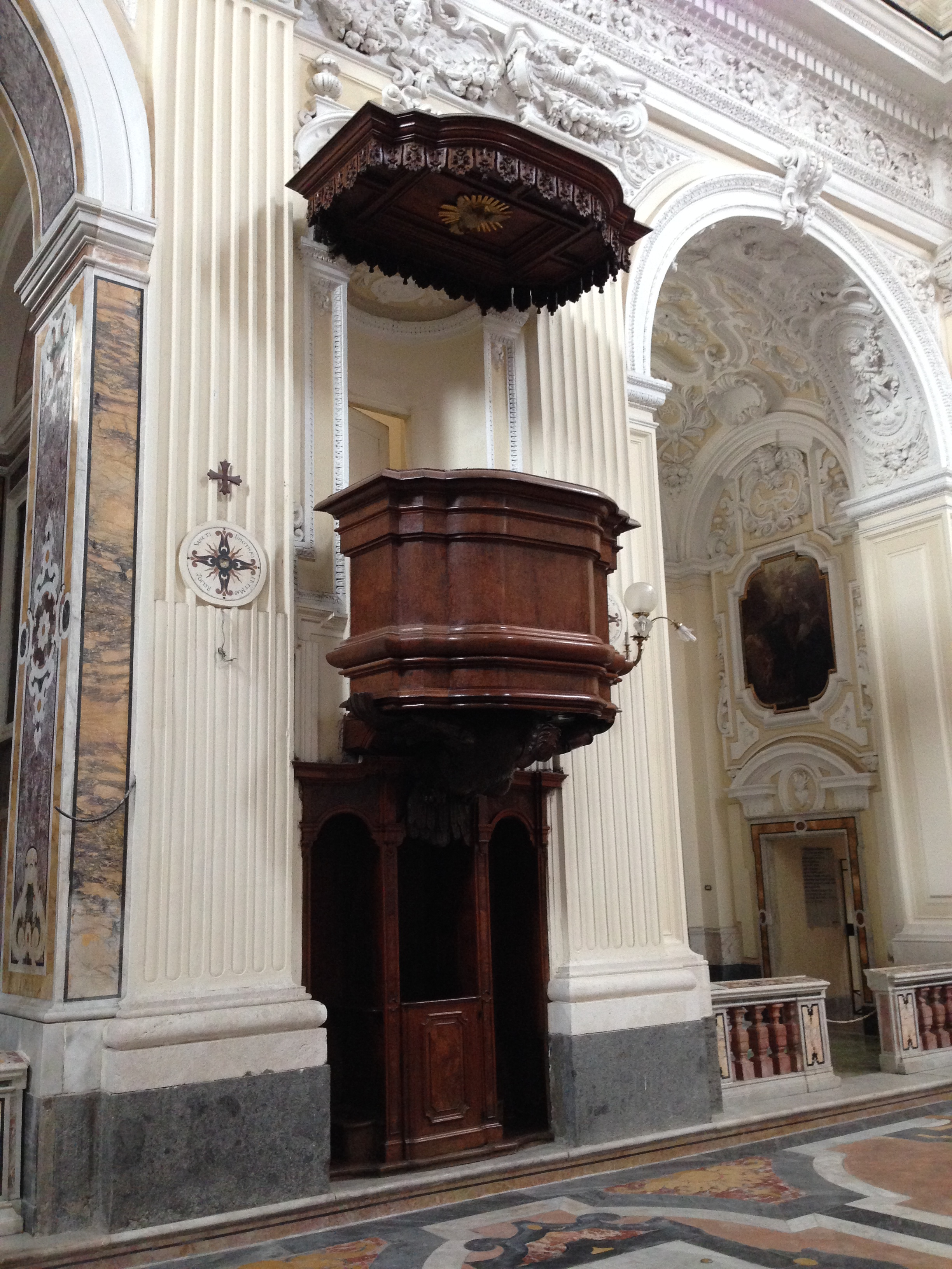 Pulpito in noce. Chiesa di Santa Maria della Verità (Napoli)